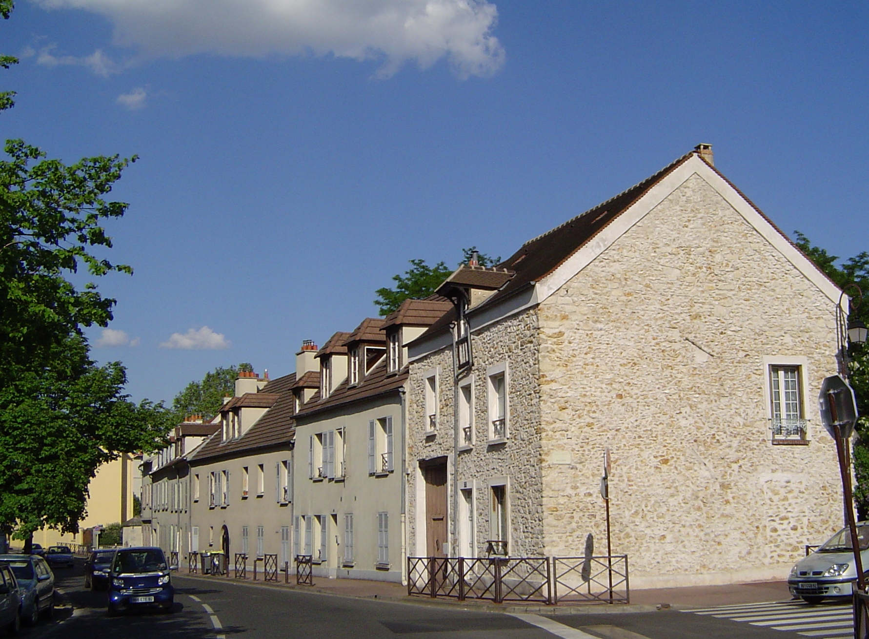 Antony